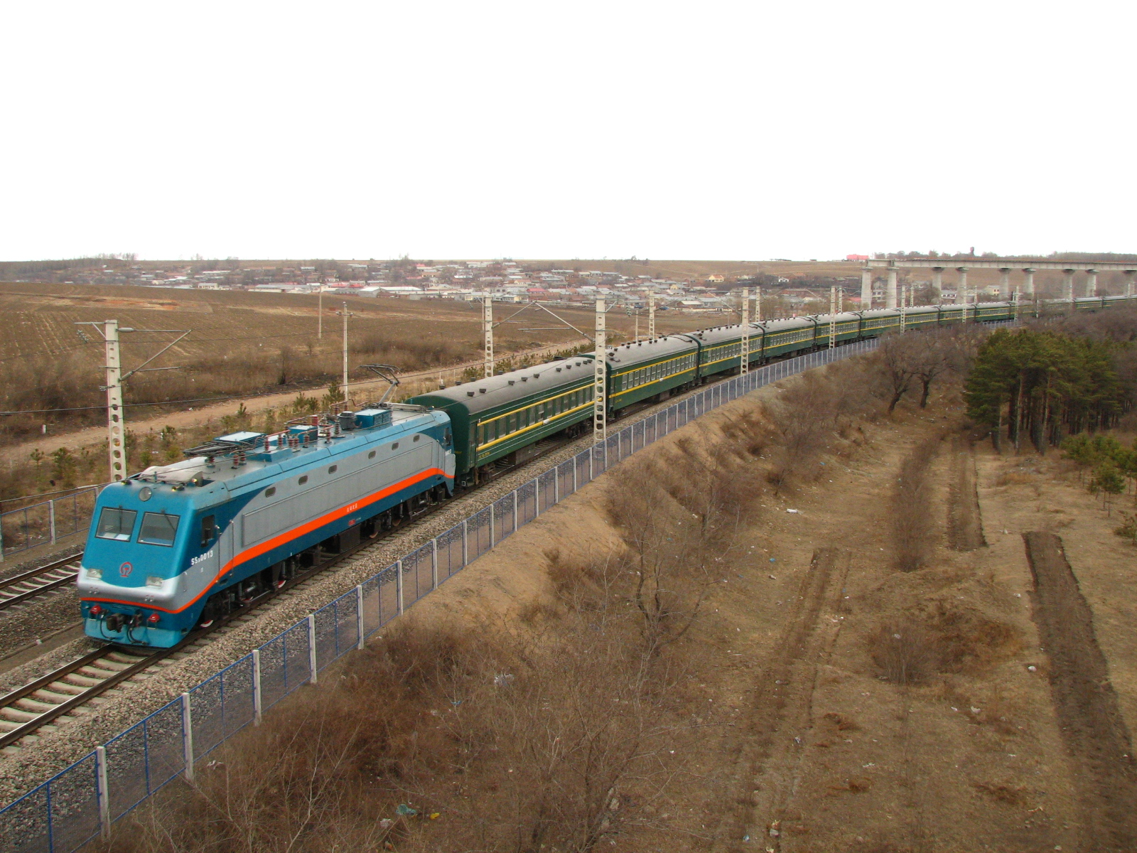 巡道工出品 Photo by Xundaogong 2006年的1548次通过